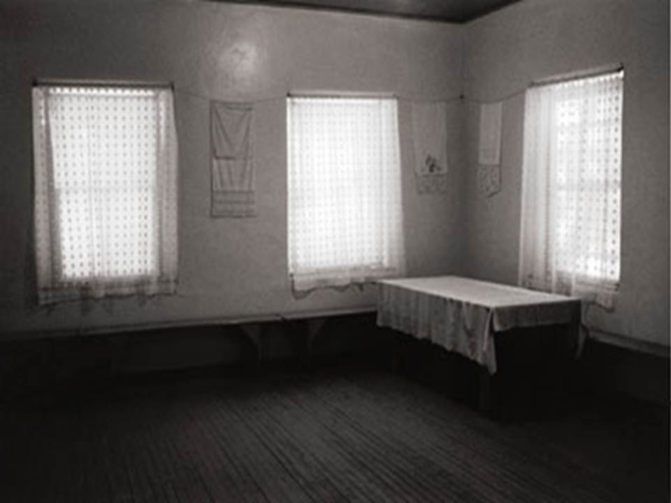 Մոլոկանների սենյակը